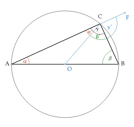 Ábra Eukleidész bizonyításához (Thalész-tétel)